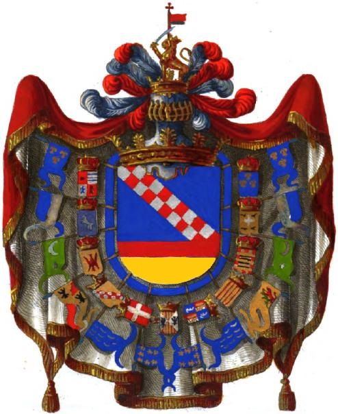 Blasone della Casa Ventimiglia di Geraci, Di rosso al capo d'oro (Ventimiglia) e Azzurro con banda scaccata di rosso e argento (Hauteville).